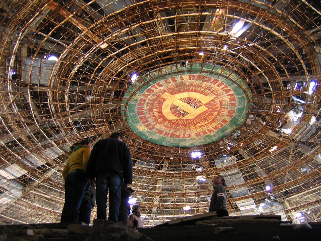 Interieur de la salle de congres de Bouzloudja